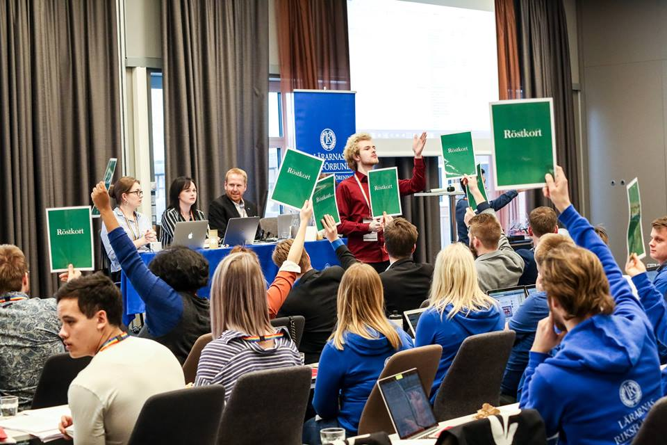 Bild tagen på LR Studs konvent 2019. Fotograf: Armin Ehrenwall